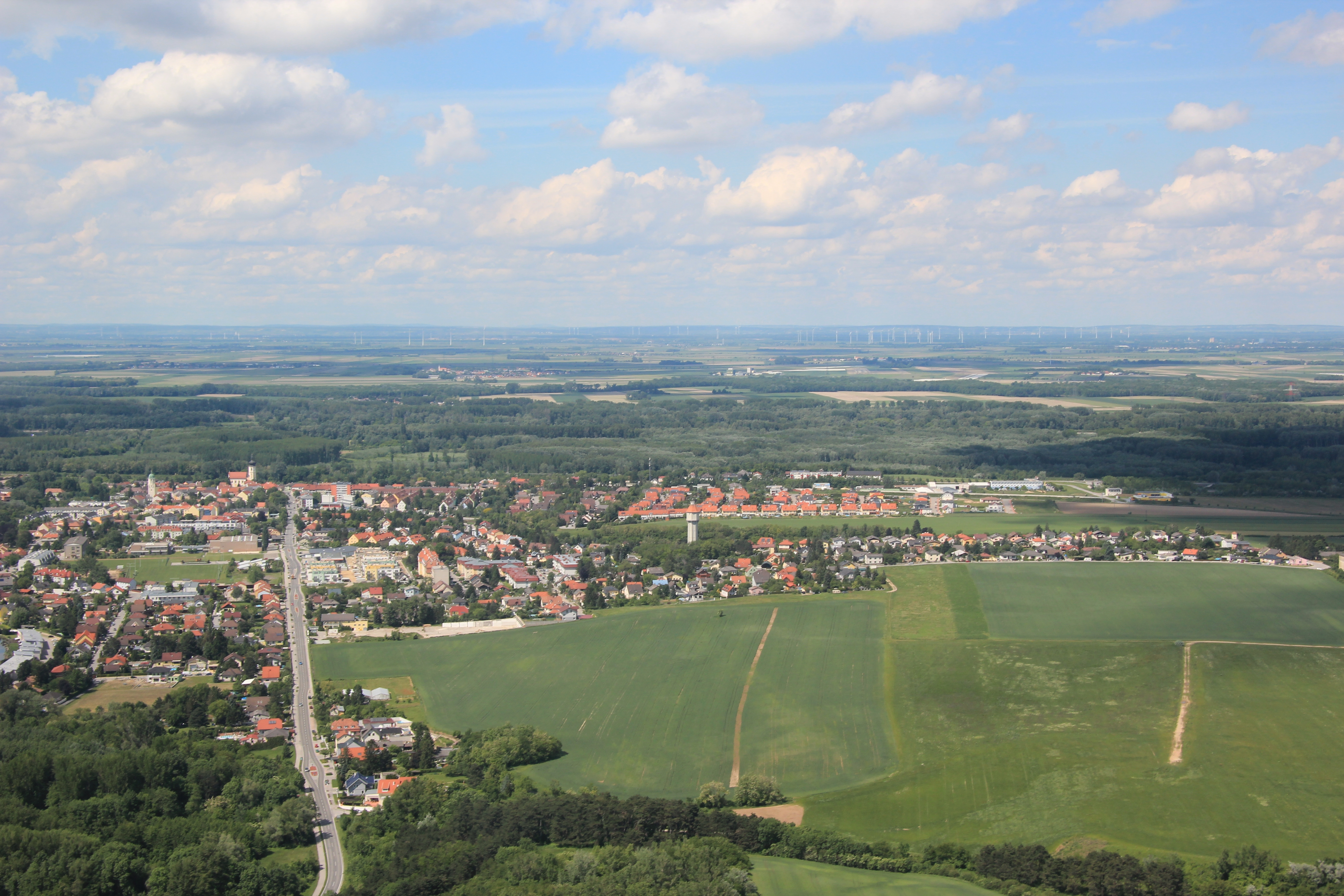 Fischamend beim Landeanflug zum Flughafen Wien